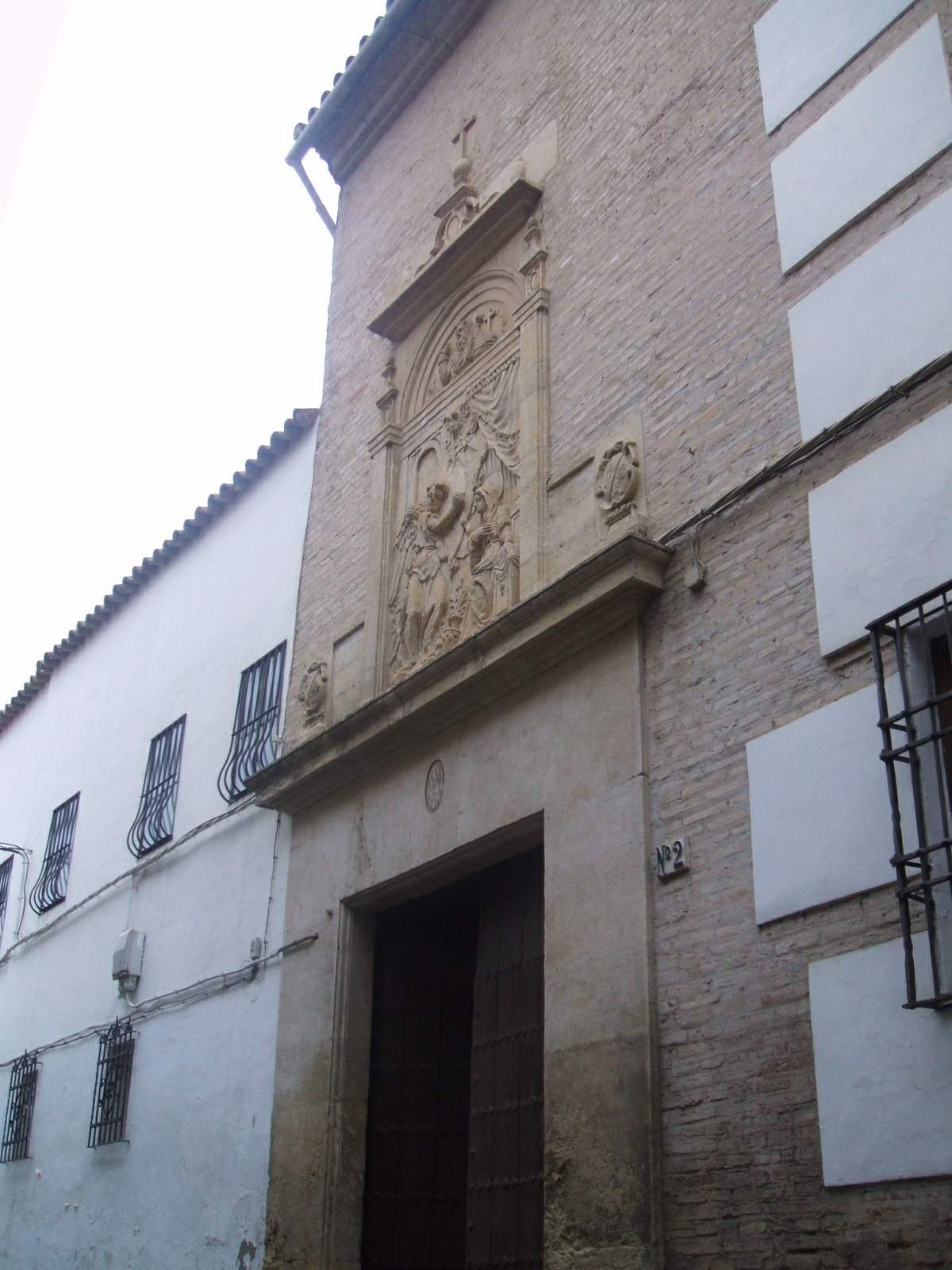 Córdoba - Monasterio de la Encarnación (MM Cistercienses)